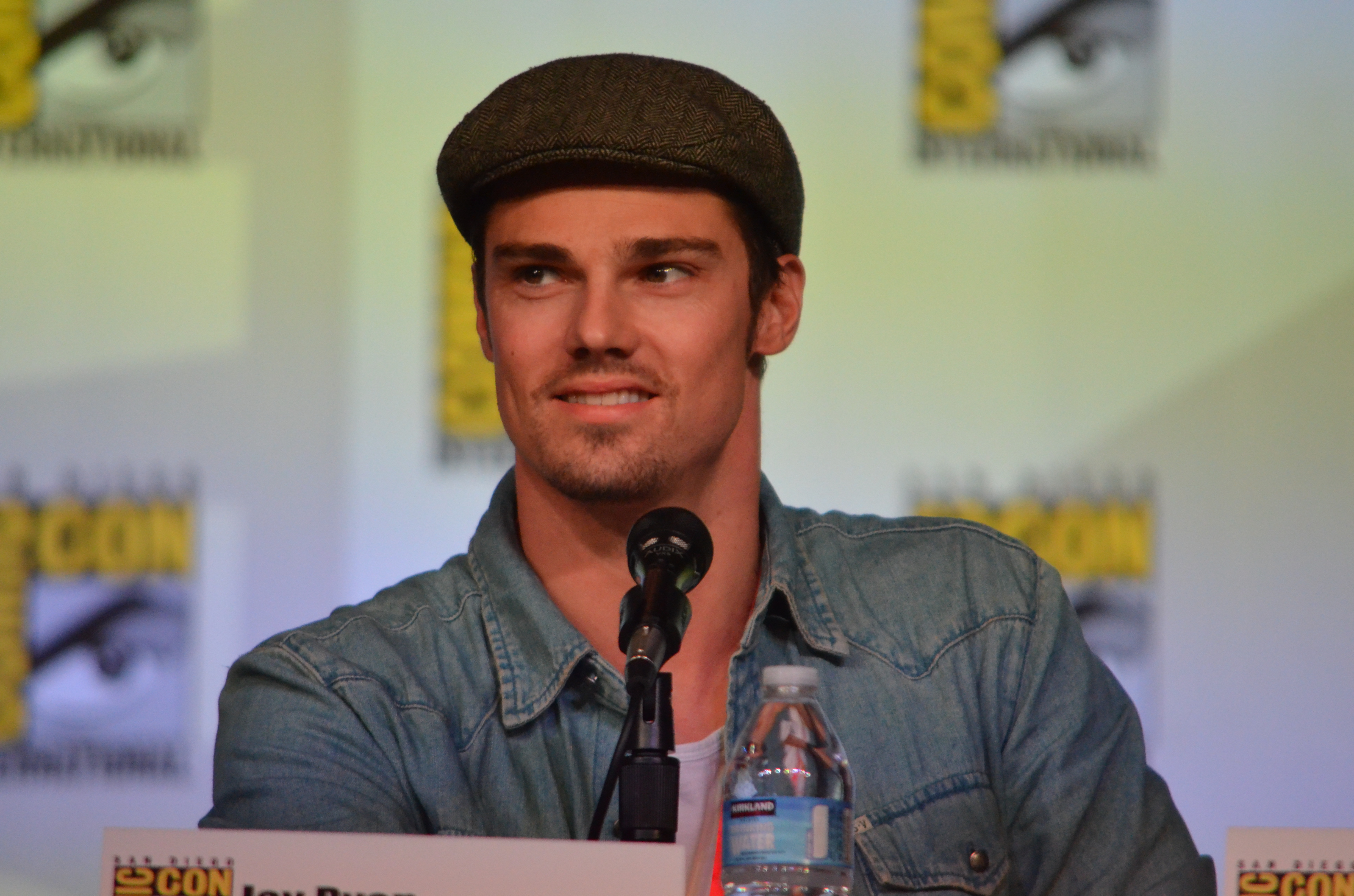 Jay Ryan